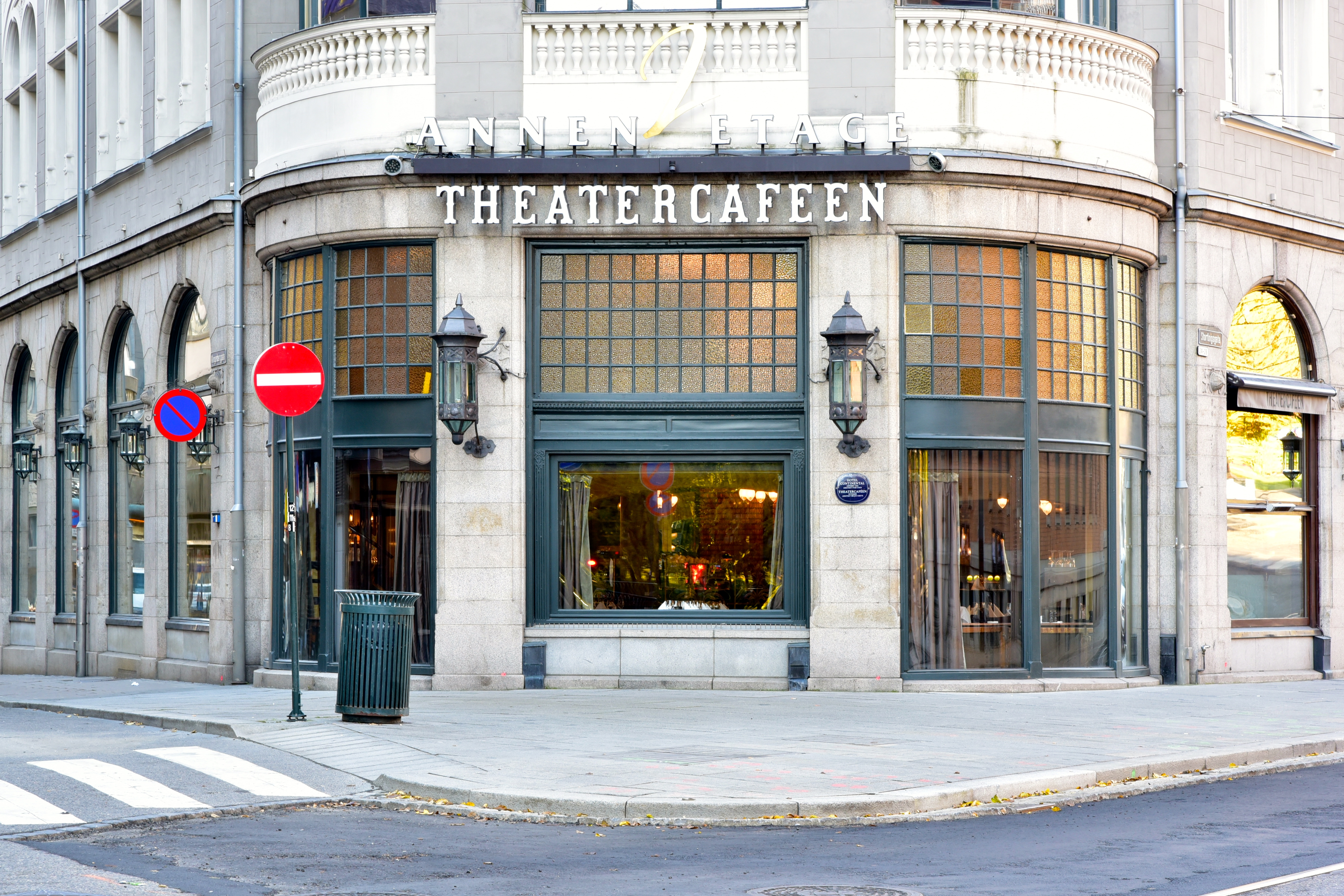 Oslo, Norway